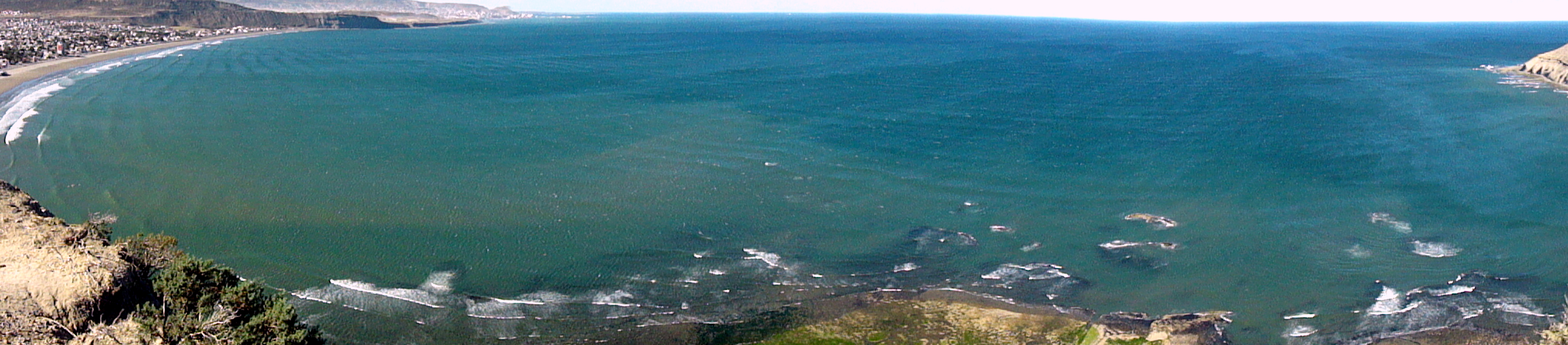 Arpón ballenero en el pequeño museo de la reserva natural punta del Marqués. Fue hallado en inmediaciones a La Lobería .